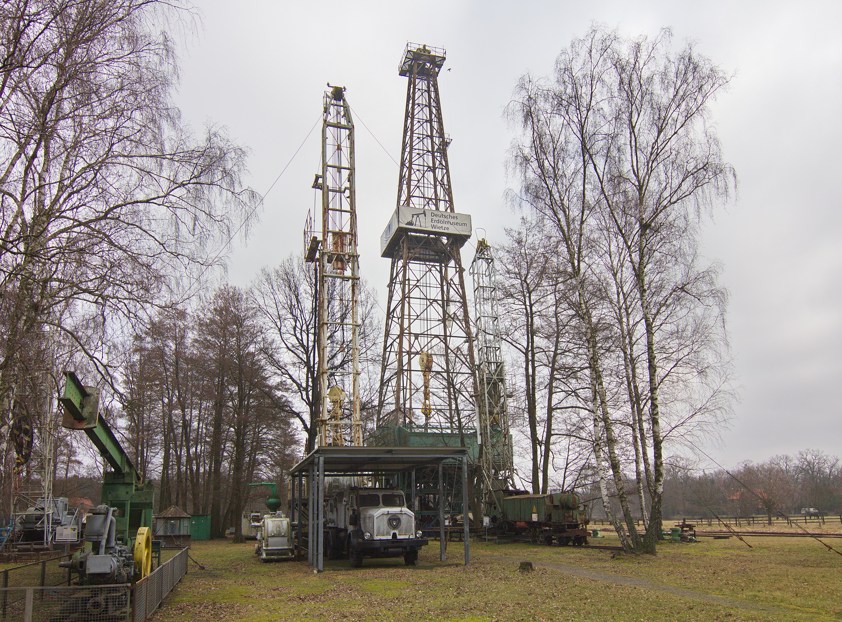 Das Deutsche Erdölmuseum Wietze befindet sich in Wietze, es wurde auf einem Teil des ehemaligen Erdölfeldes Wietze eingerichtet und 1970 eröffnet.